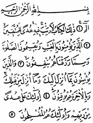 Kur'an-ı Kerîm (Sayfa 1)